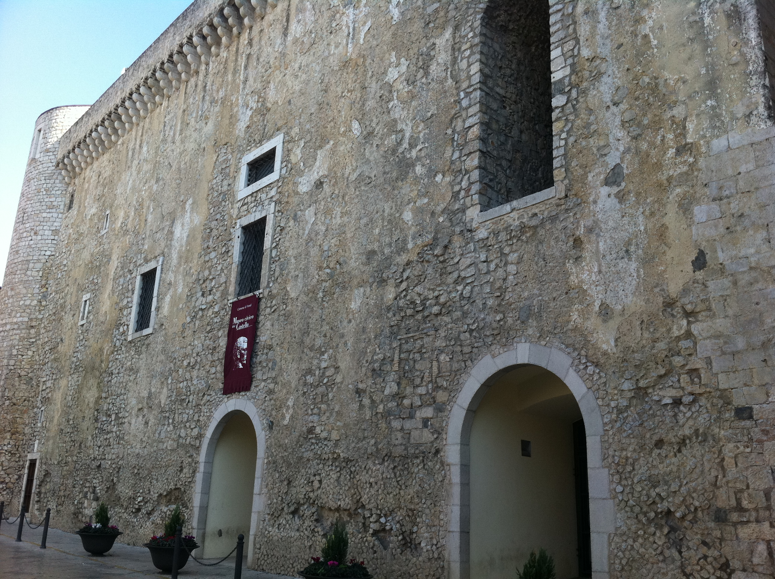 Burg Fondi1